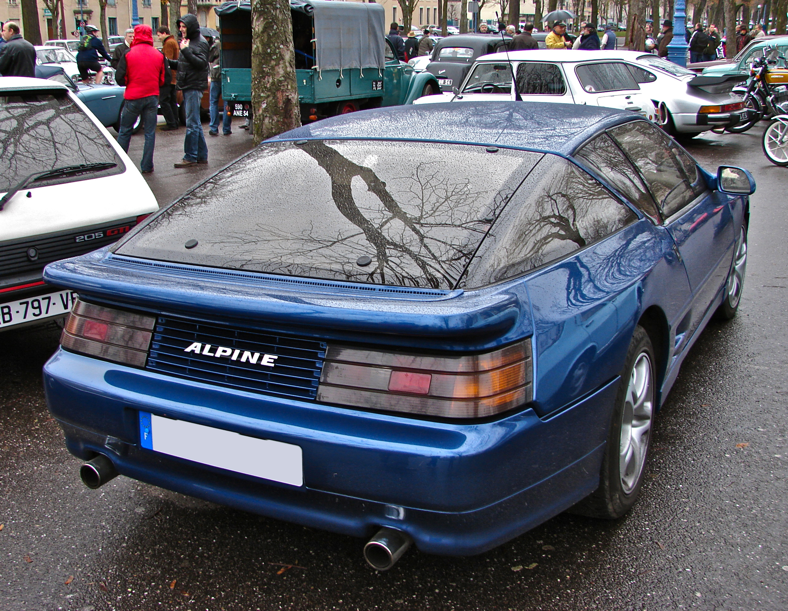 Renault Alpine A610 Turbo